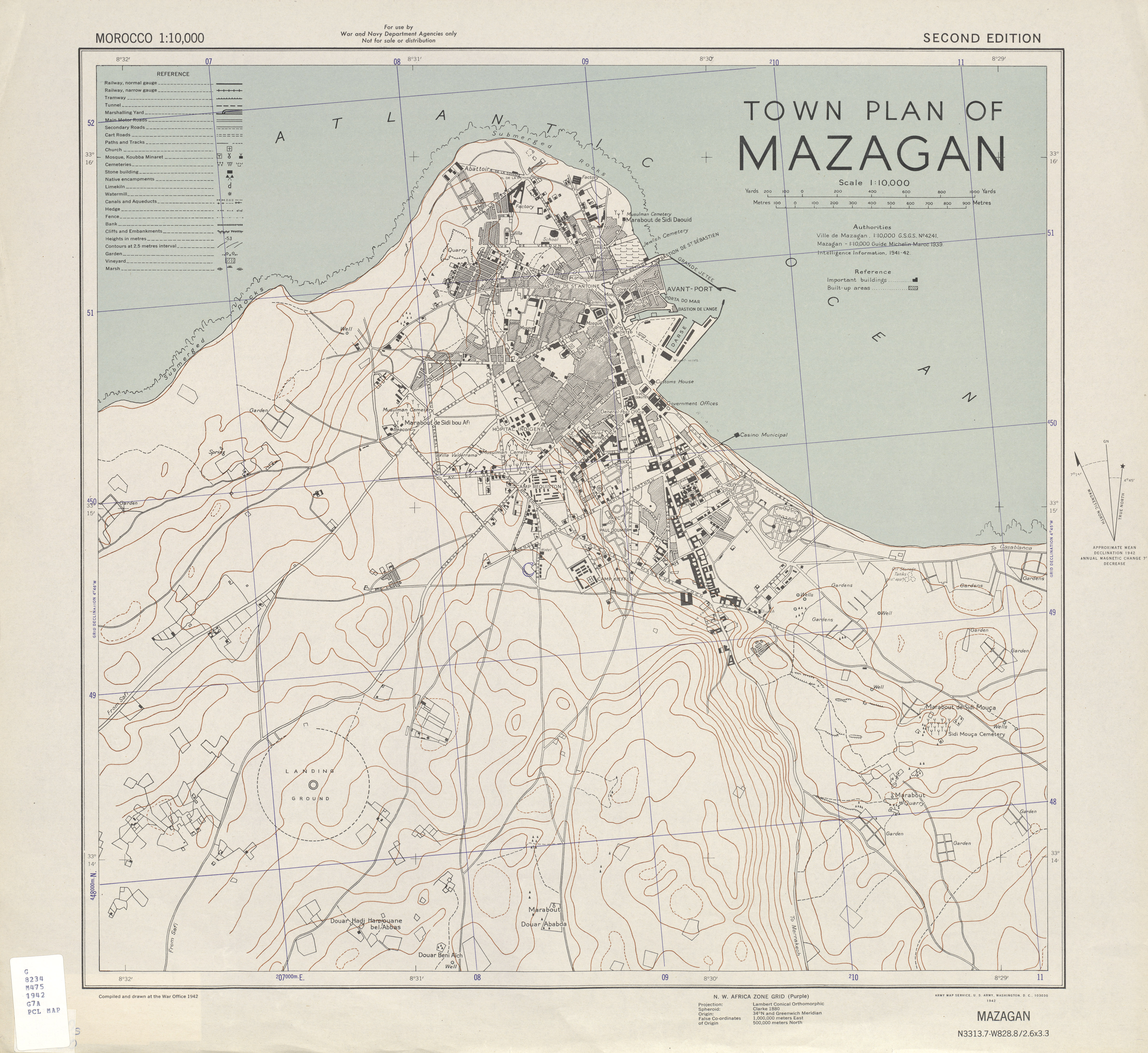 خريطة لمدينة مازاغان أي الجديدة المغربية من إعداد الحكومة الأميركية عام 1942 في الاستعداد للتنشط في المغرب خلال الحرب العالمية الثانية